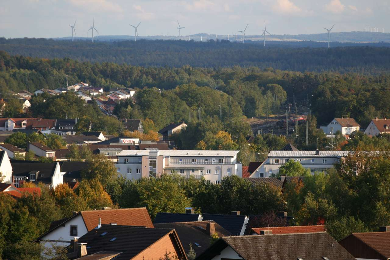 Blick über Stadtallendorf mit Bahnhof (Bildmitte)